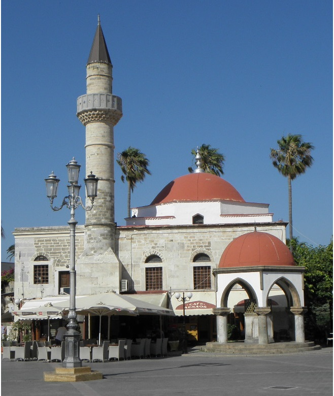 Defterdar Mosque; Kos (GR)